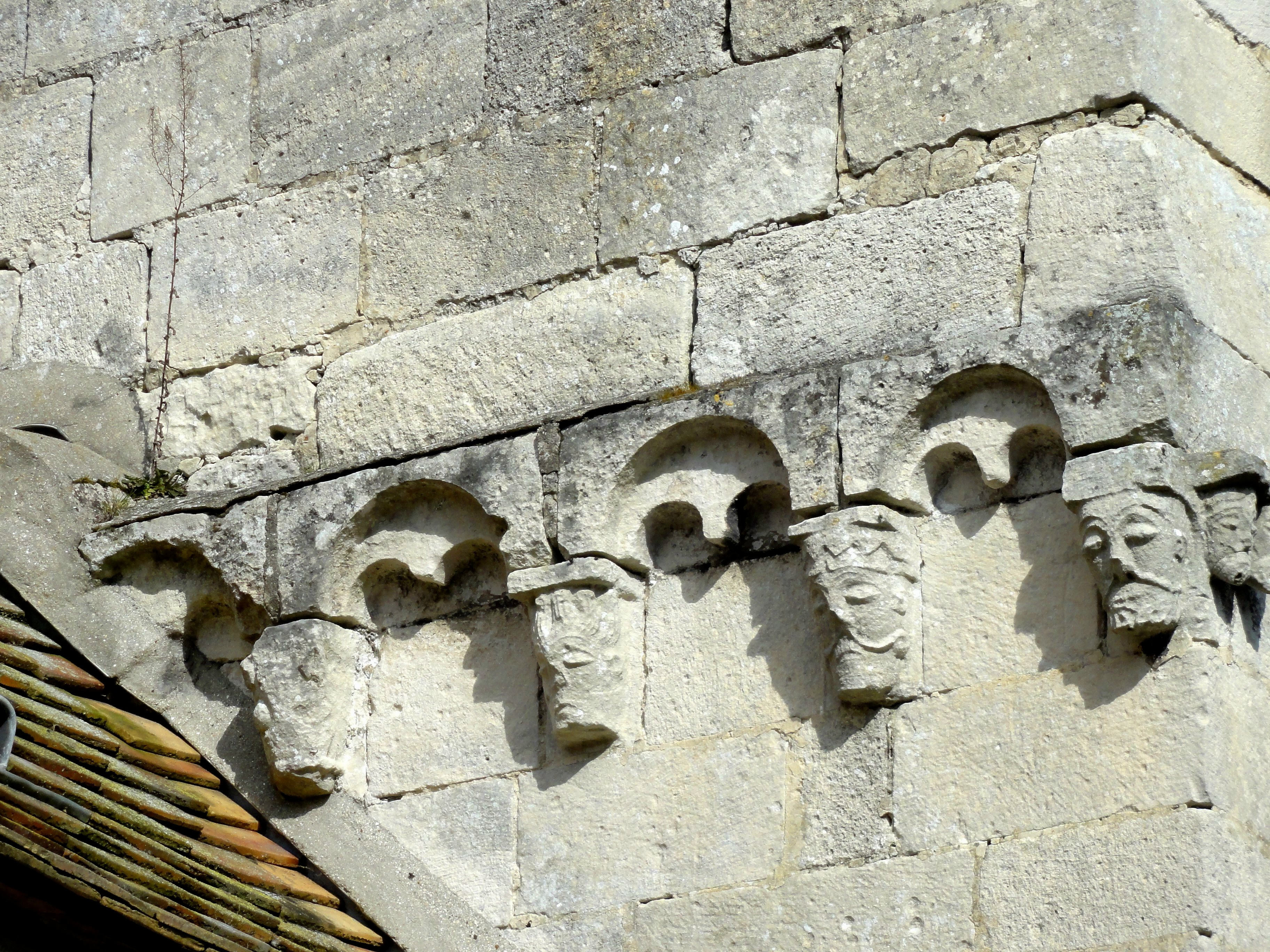 Corniche beauvaisine et masques sur le mur occidental du collatéral sud du chœur.